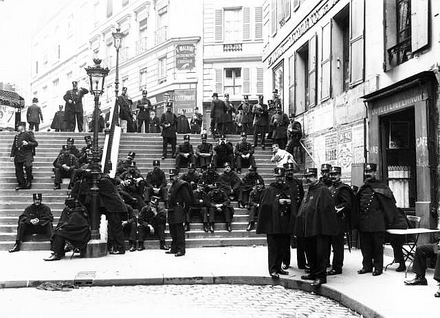 Policiers veillant rue Antoine-Dubois, lors de troubles à l'École de médecine de Paris.